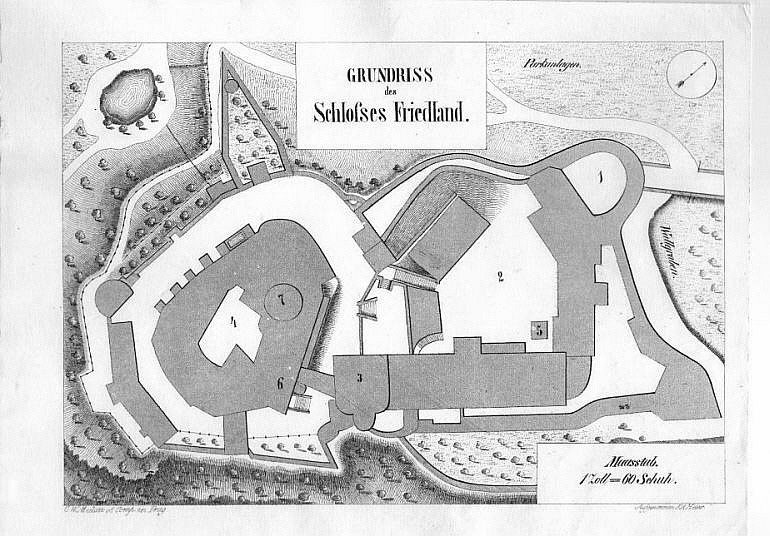 Plan von Schloss Friedland / Frydlant in Böhmen